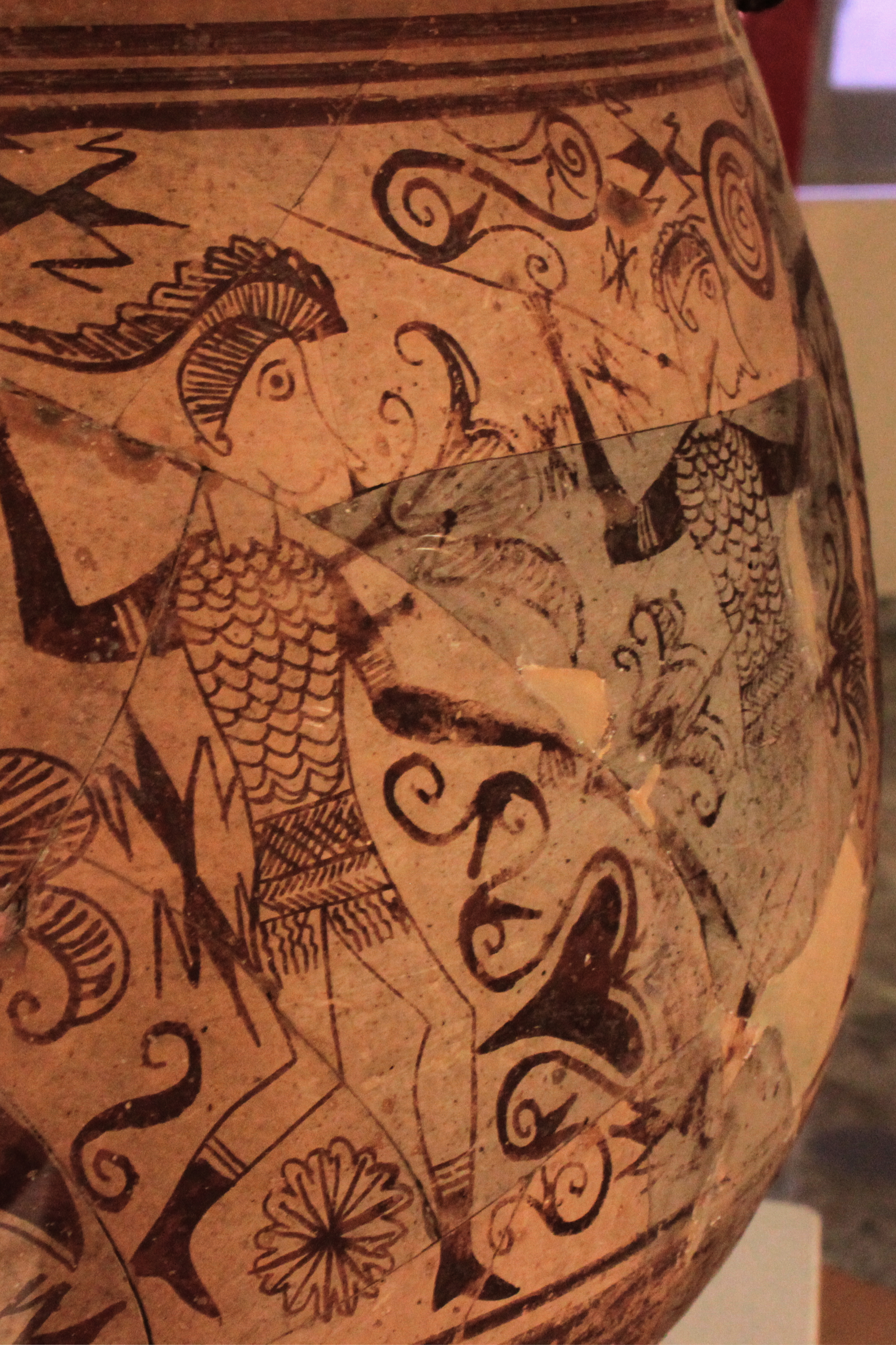 Detalle del Vaso del Guerrero, siglo III al II a. C del Tossal de Sant Miquel. Depositada en el Museo de Prehistoria de Valencia, Comunidad valenciana, España.